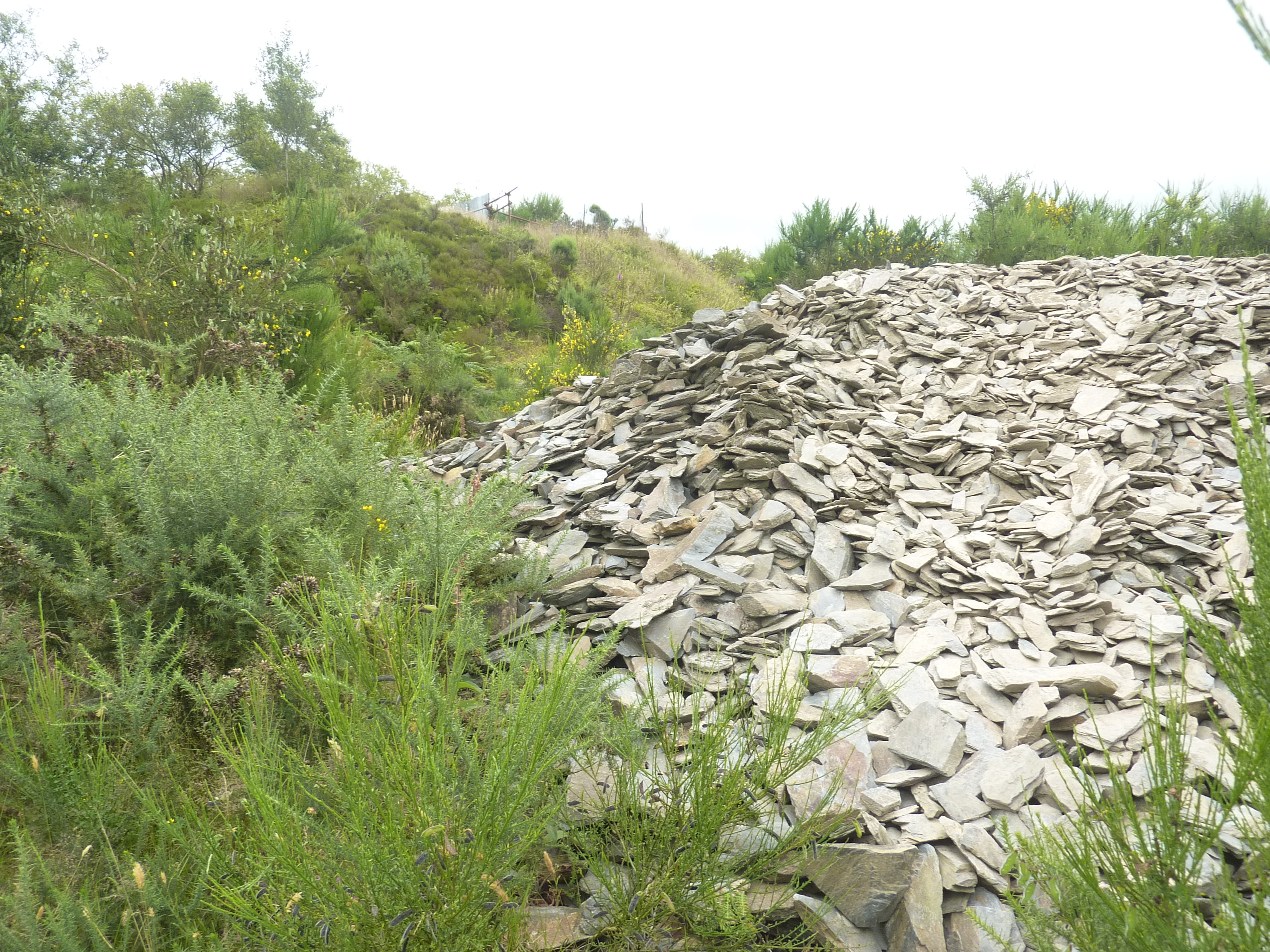 Commana : terril d'une ancienne carrière d'ardoise en amont de la tourbière du Mougau (versant nord des Monts d'Arrée).